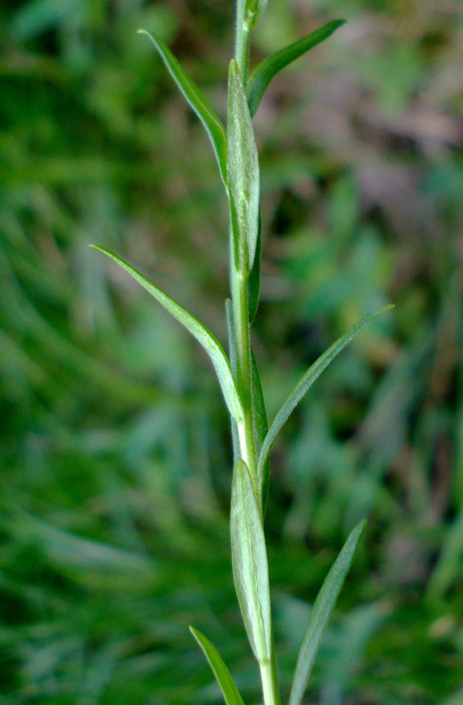 Polygala amarella (Unterfranken, Germany)